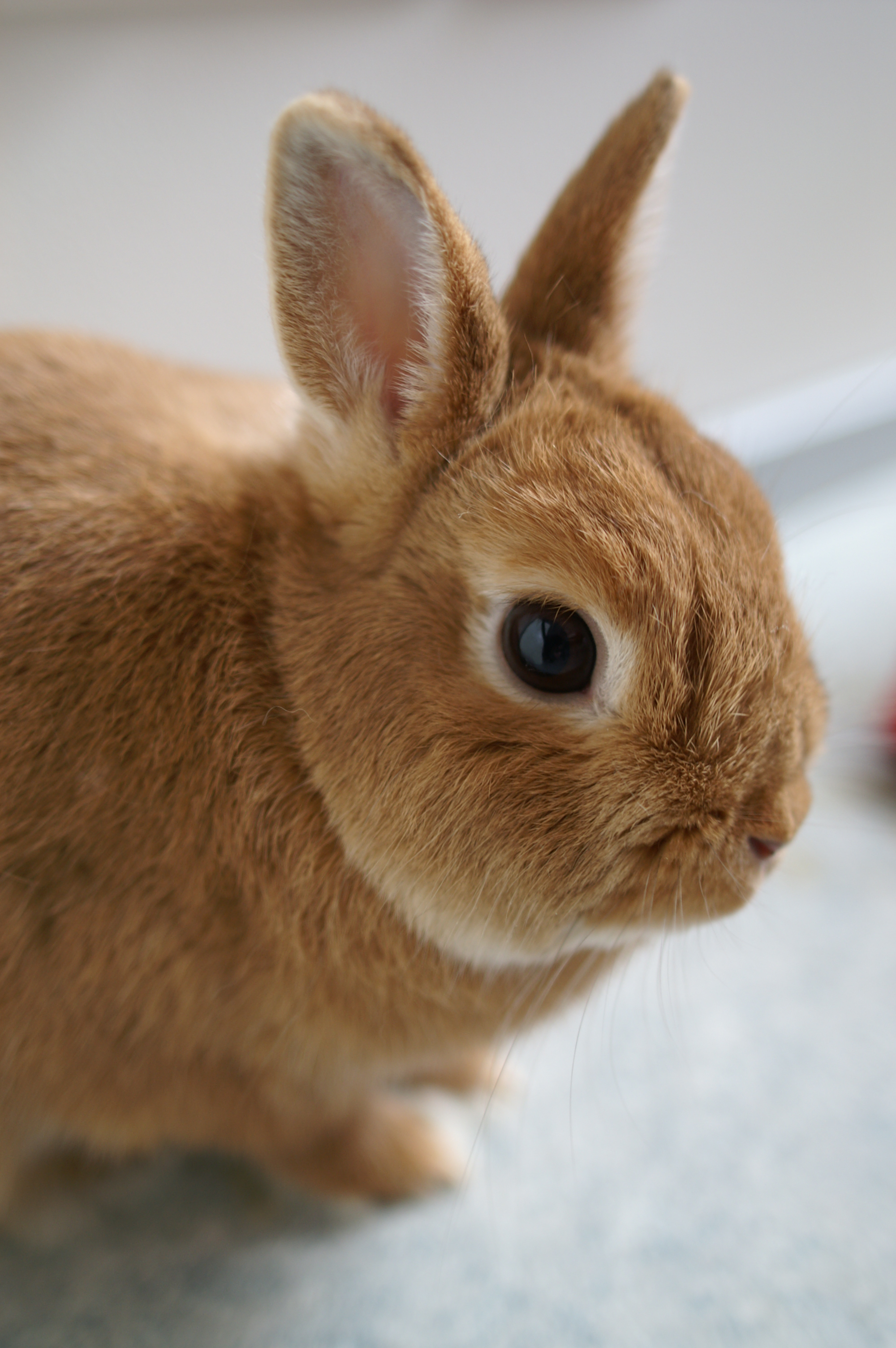 Höpö